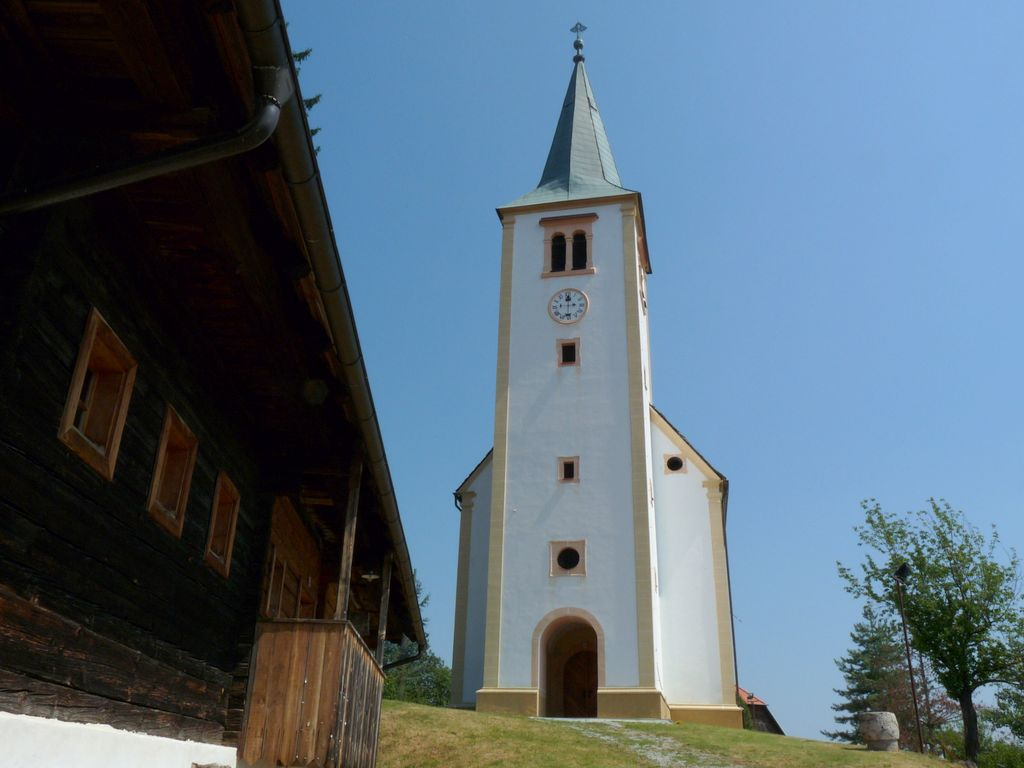 Sv. Uršula, Vodule, od blizu